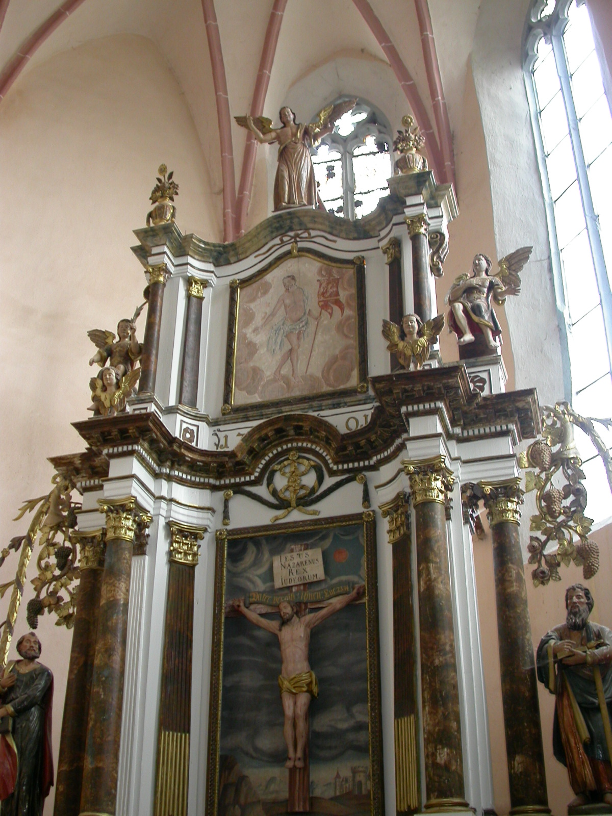 Ansamblul bisericii evanghelice fortificate, sec. XIV - XVII